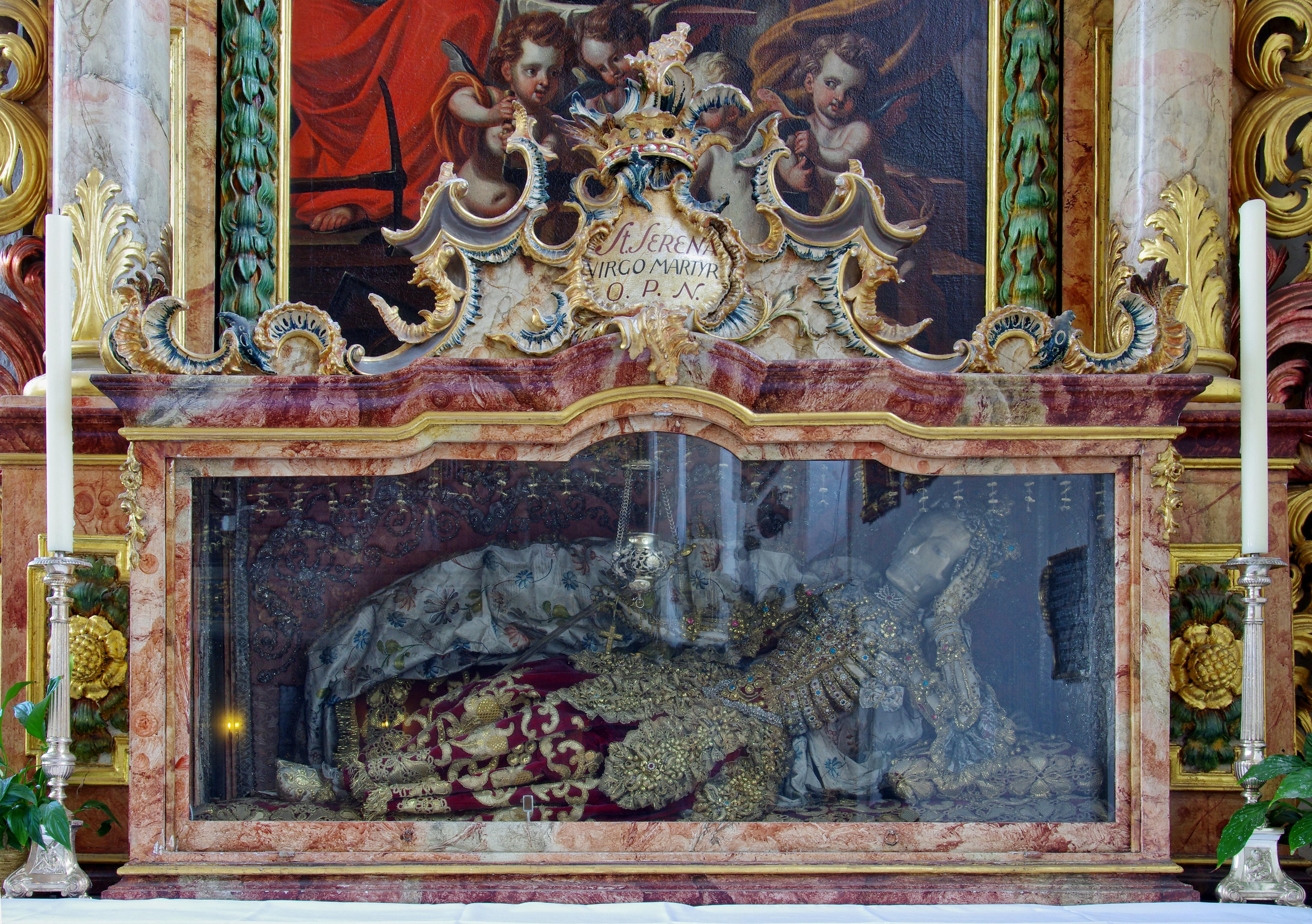 Bilder der Wallfahrtskirche "Maria in der Tanne" in Triberg Schwarzwald